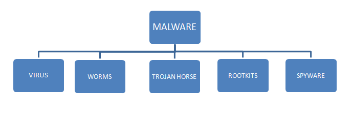 Монгол: malware